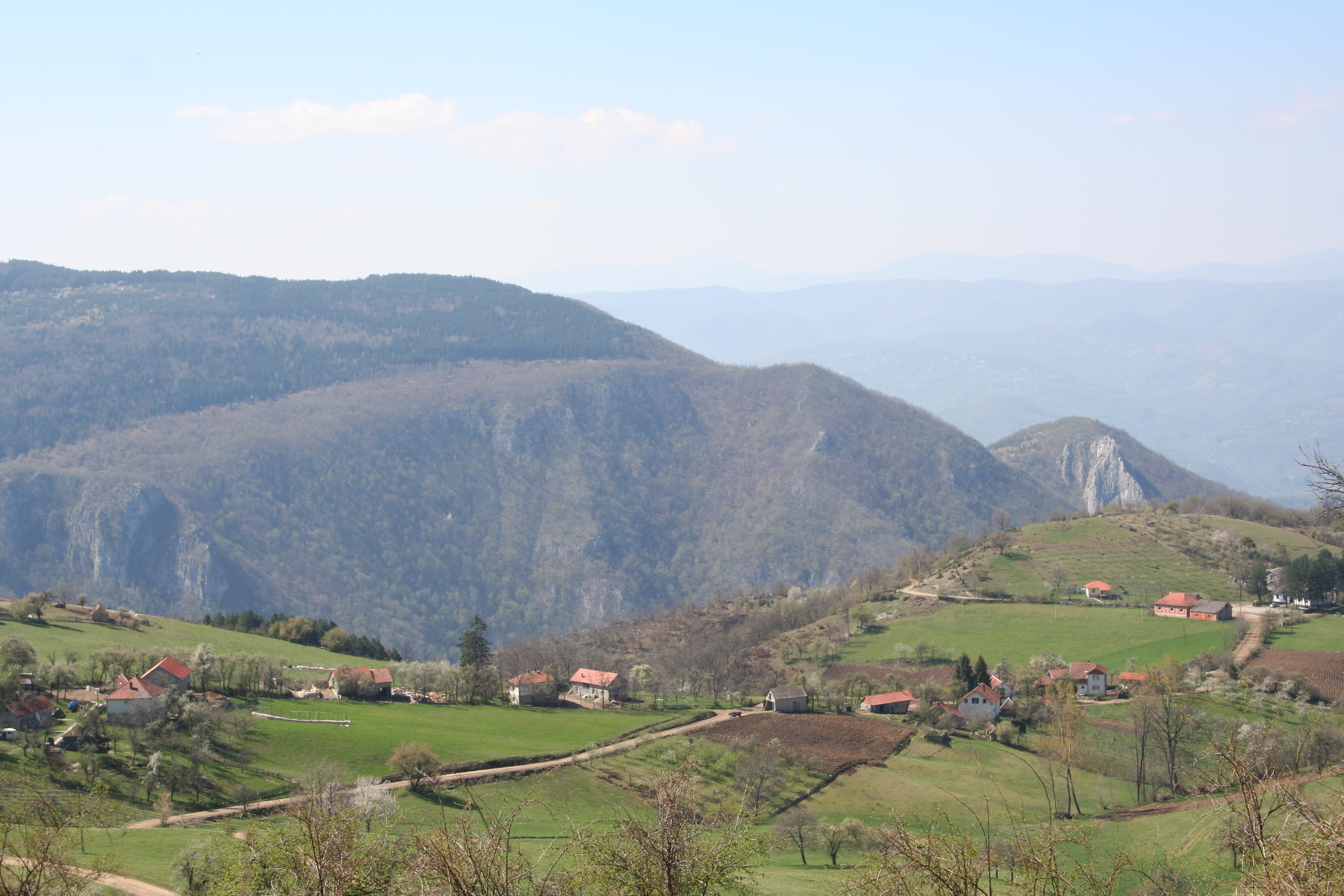 Put za Bobiju